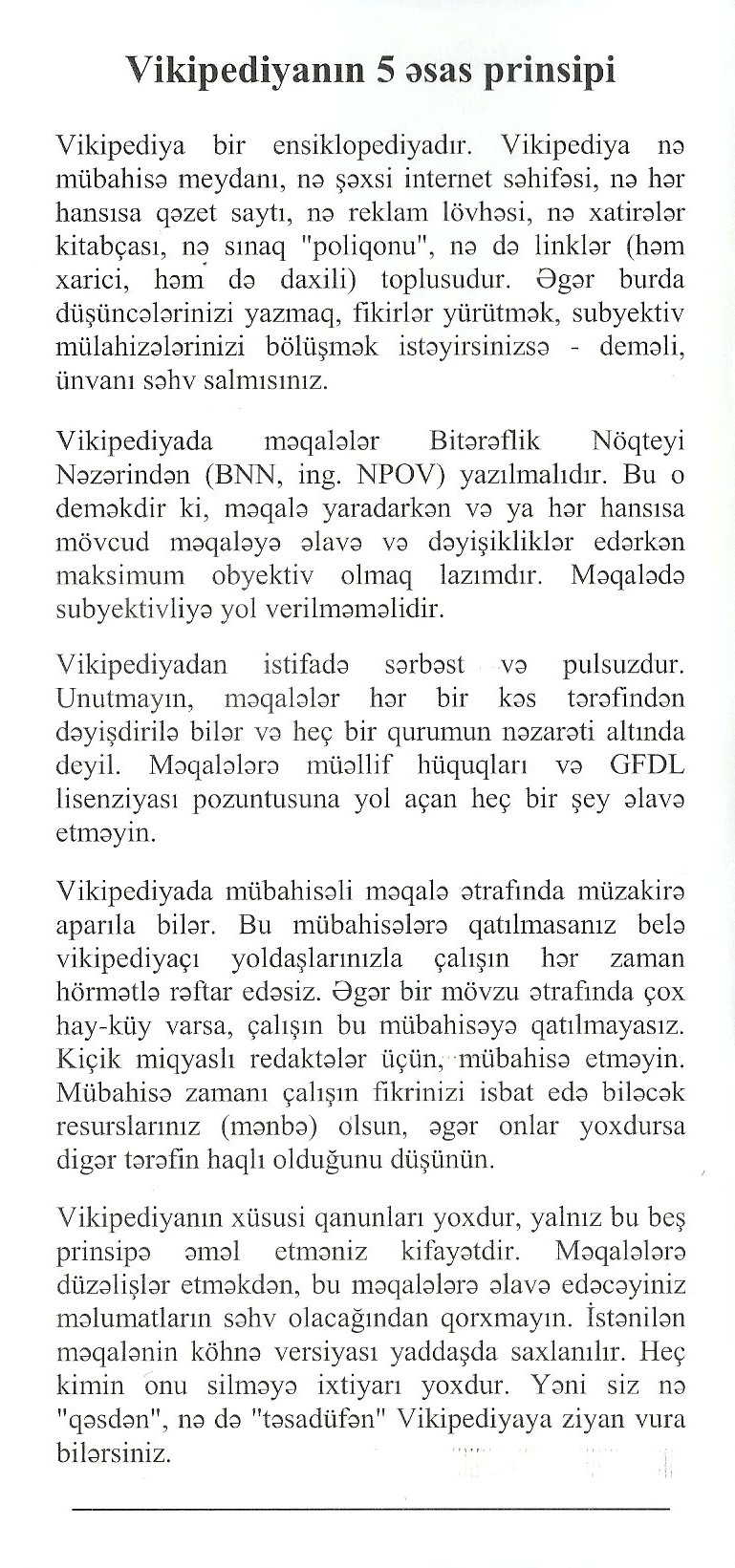 Vikipediya-Azərbaycan İB-nin ilk bukleti